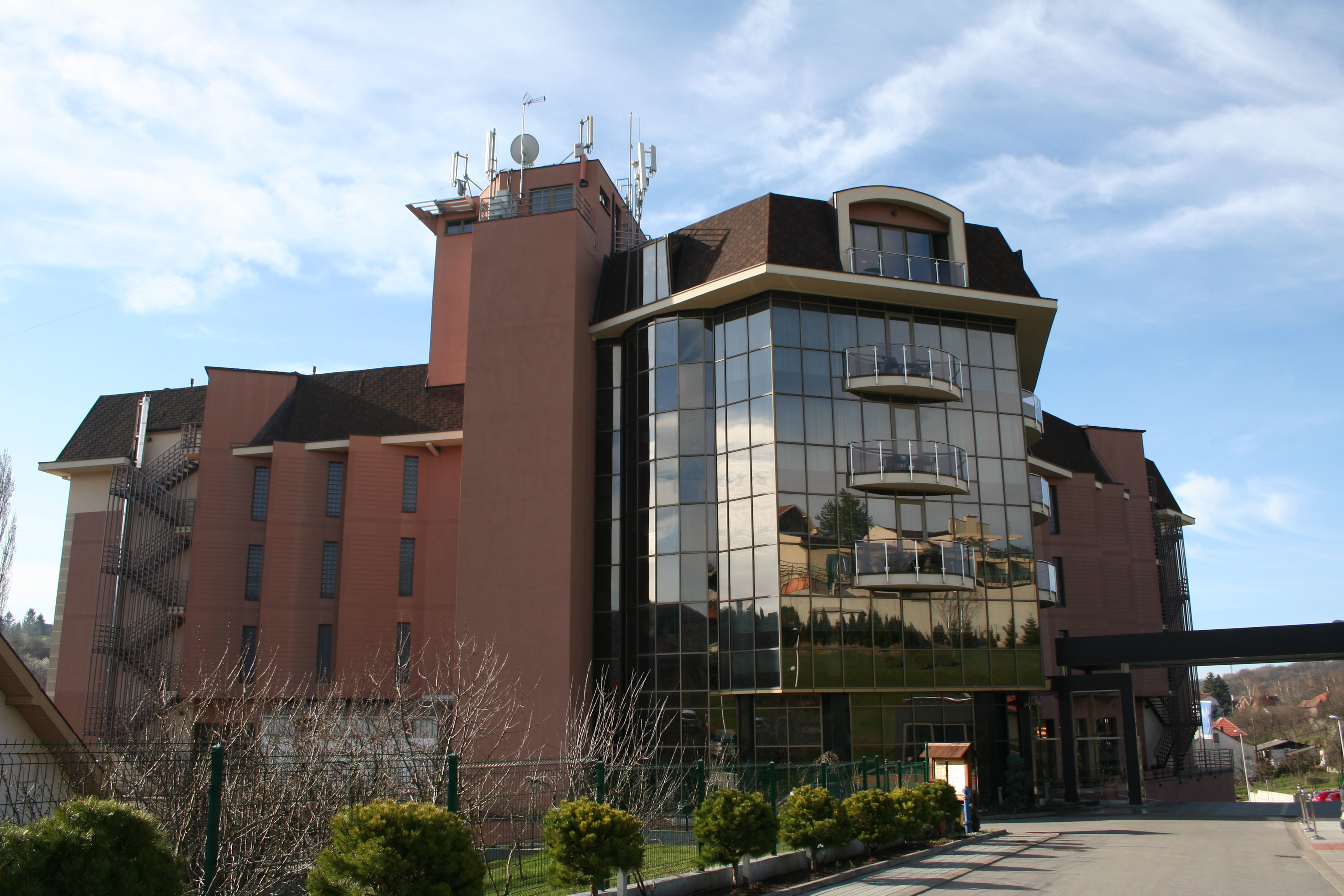 Hotel Premier Aqua